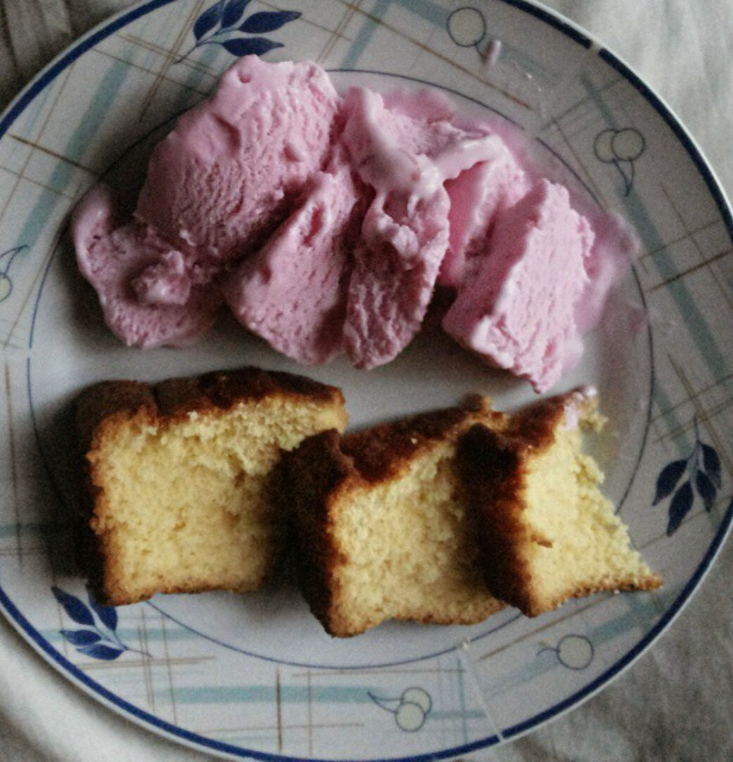 Queque con helados.